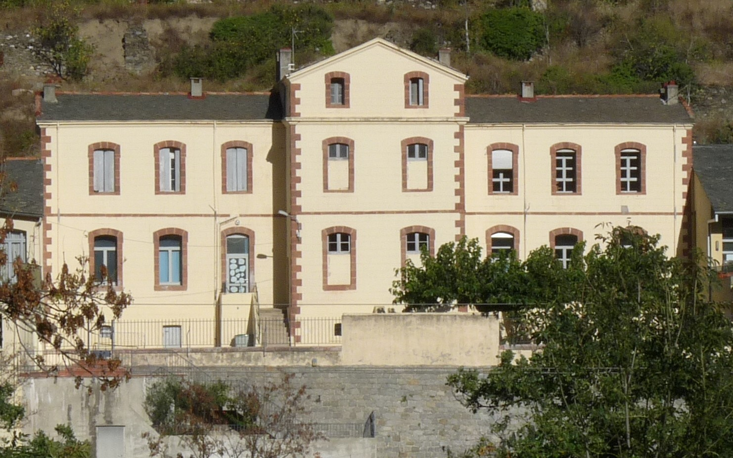 Mairie de Serdinya, Pyrénées-Orientales, France